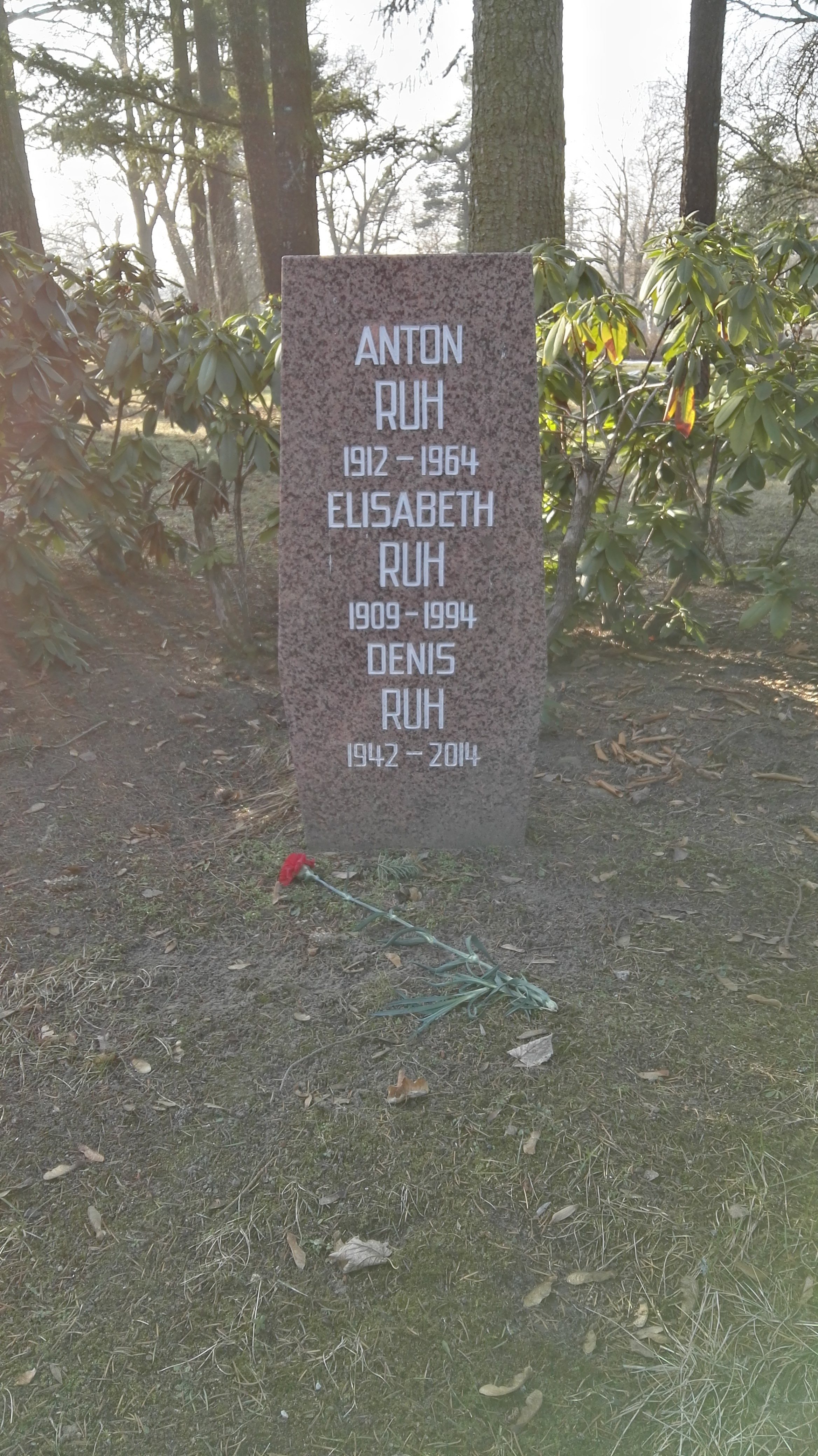 Grab von Anton Ruh, Elisabeth Ruh und Denis Ruh in der Grabanlage Pergolenweg auf dem Sozialistenfriedhof des Zentralfriedhofs Friedrichsfelde